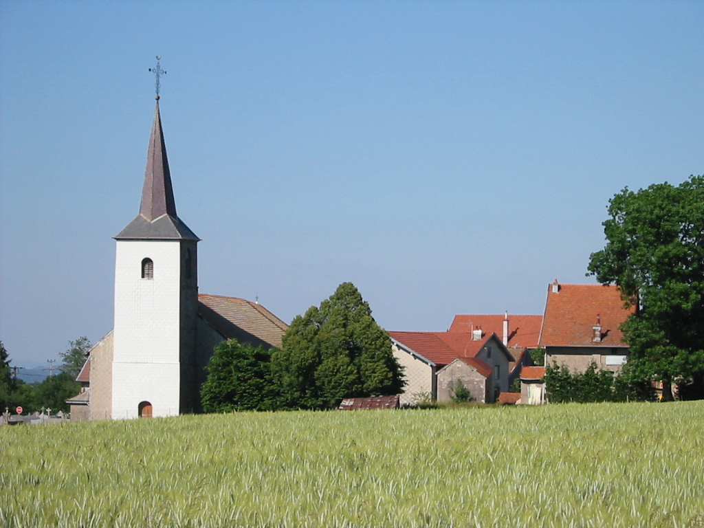 Champdray Commune du canton de Corcieux (Vosges) Photo personnelle du 1er juillet 2006. Copyright © Christian Amet